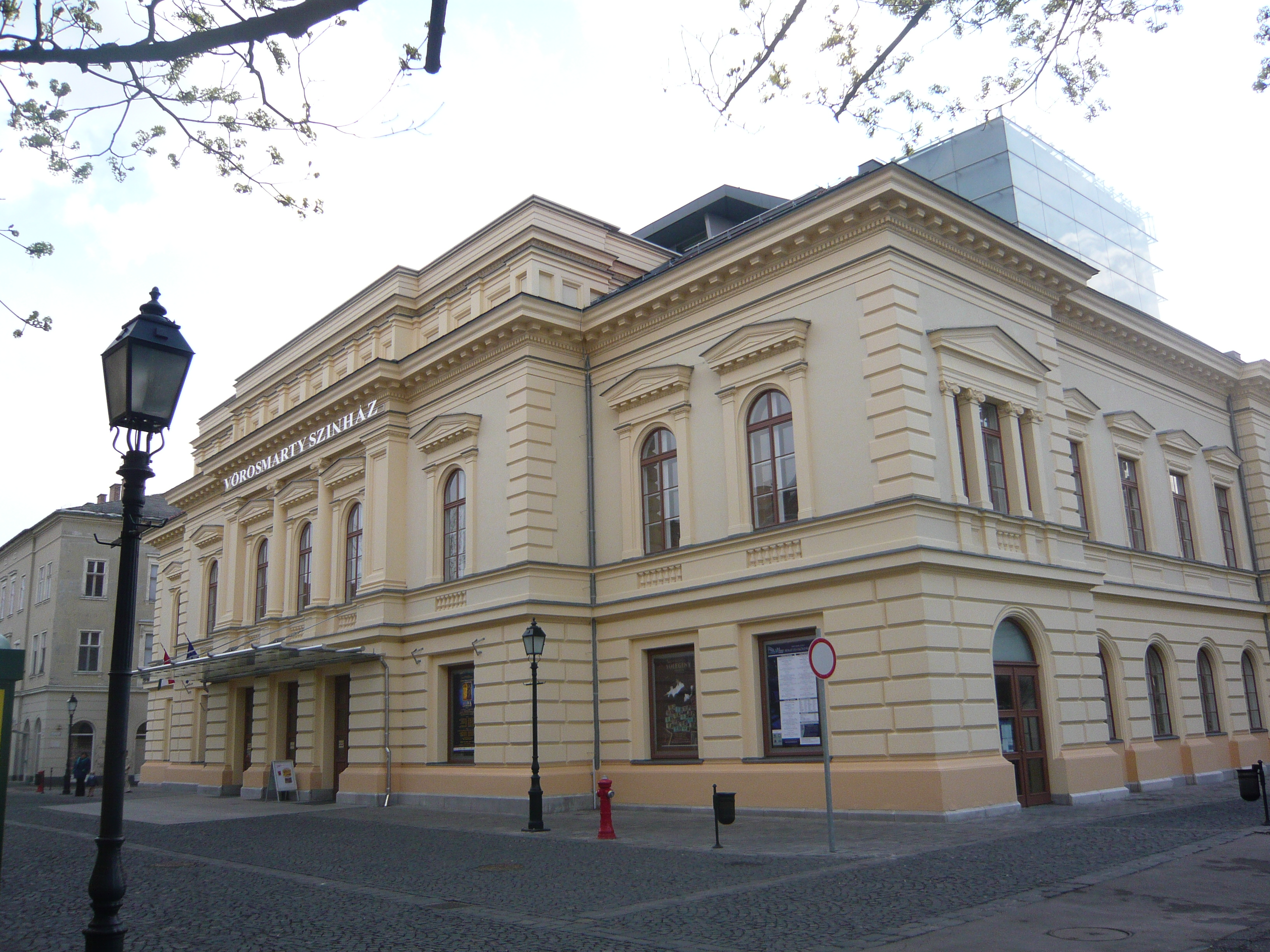 Vorosmarty Szinhaz ヴェレシュマルティ劇場,Székesfehérvár,Hungary（セーケシュフェヘールヴァール,ハンガリー）でHide-spが撮影。